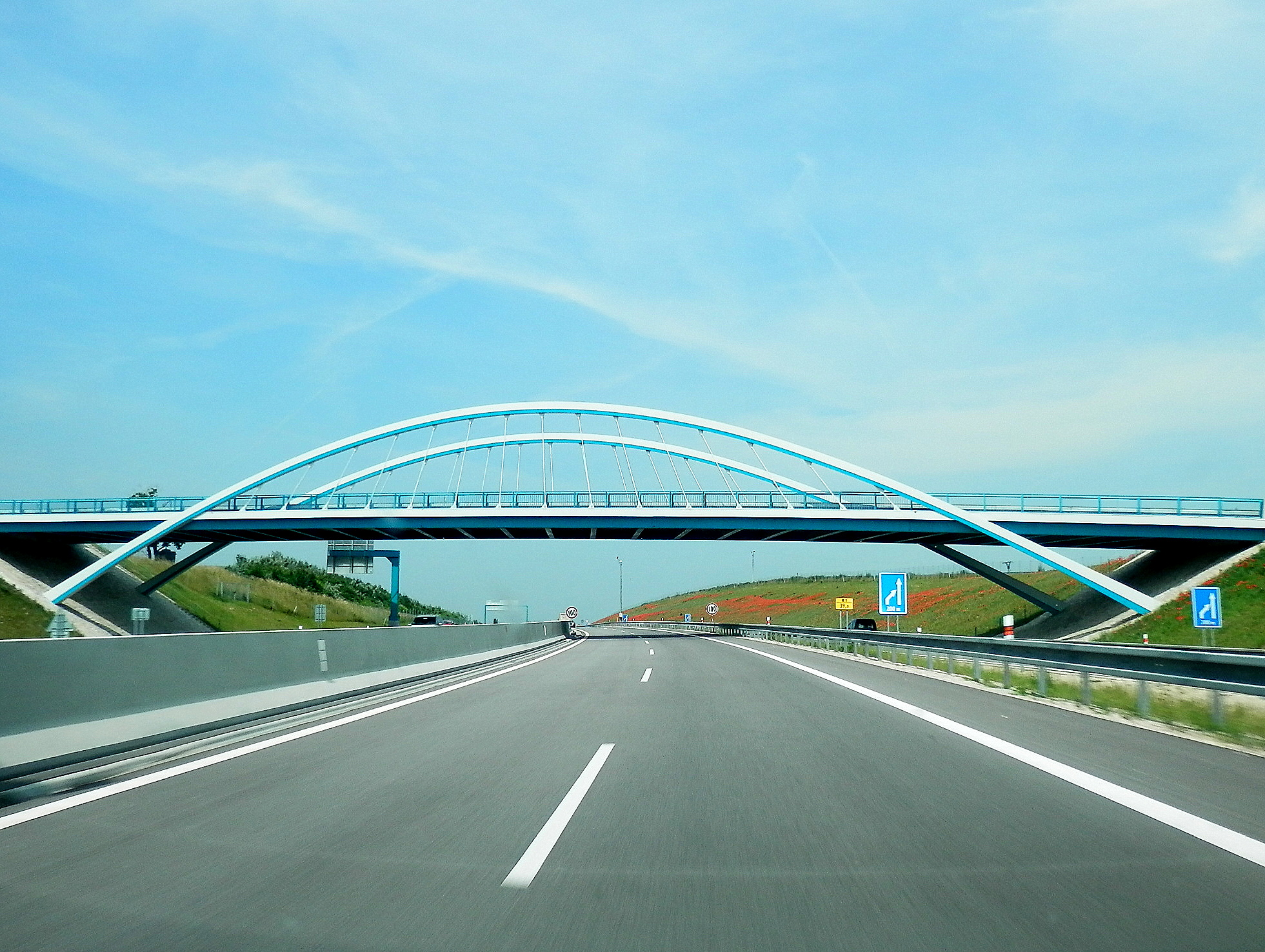 Rýchlostný úsek cesty R1 medzi Nitrou a Bratislavou.